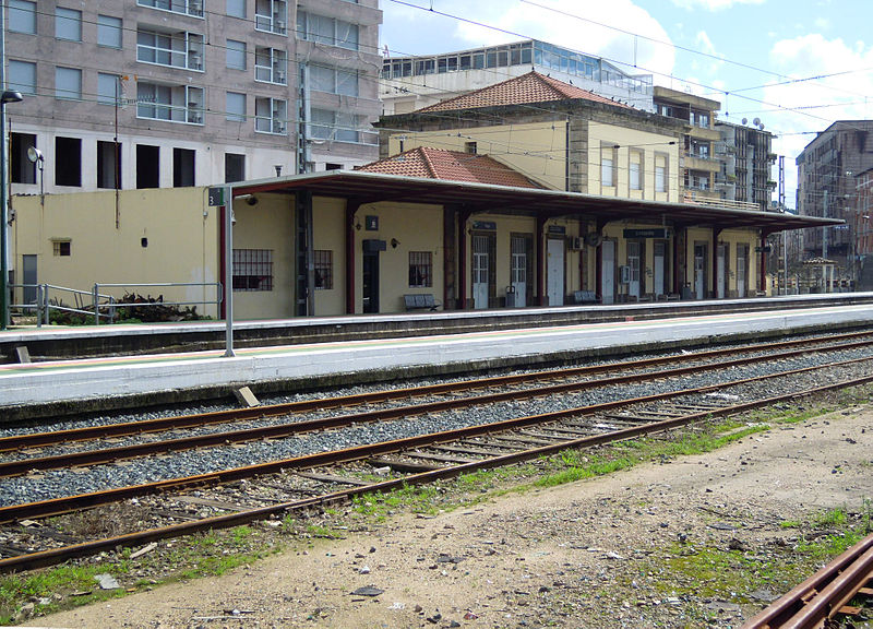 Estación de ferrocarril do Porriño.